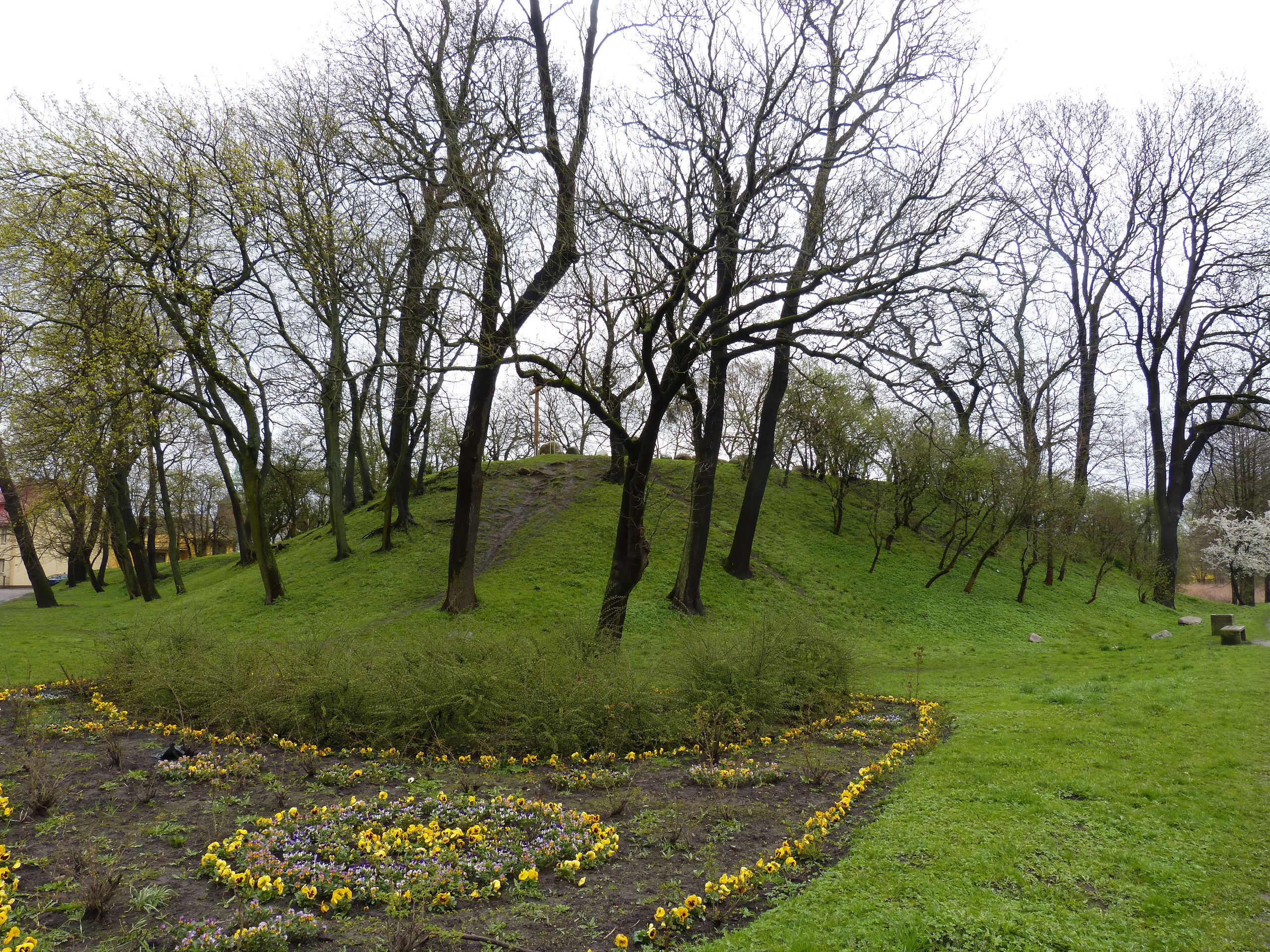 Zamek Białogard